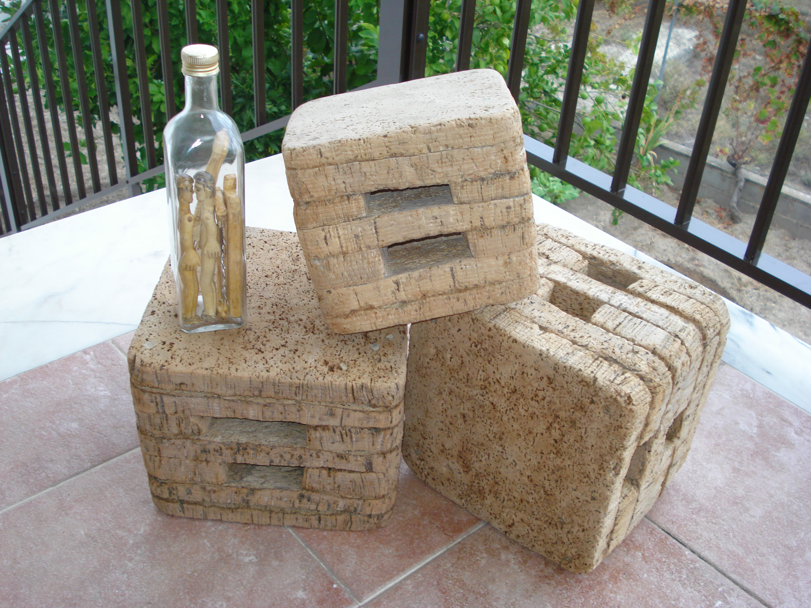 Trapeços, ou trepessos, são pequenos bancos feitos de cortiça e pregados com paus de esteva.